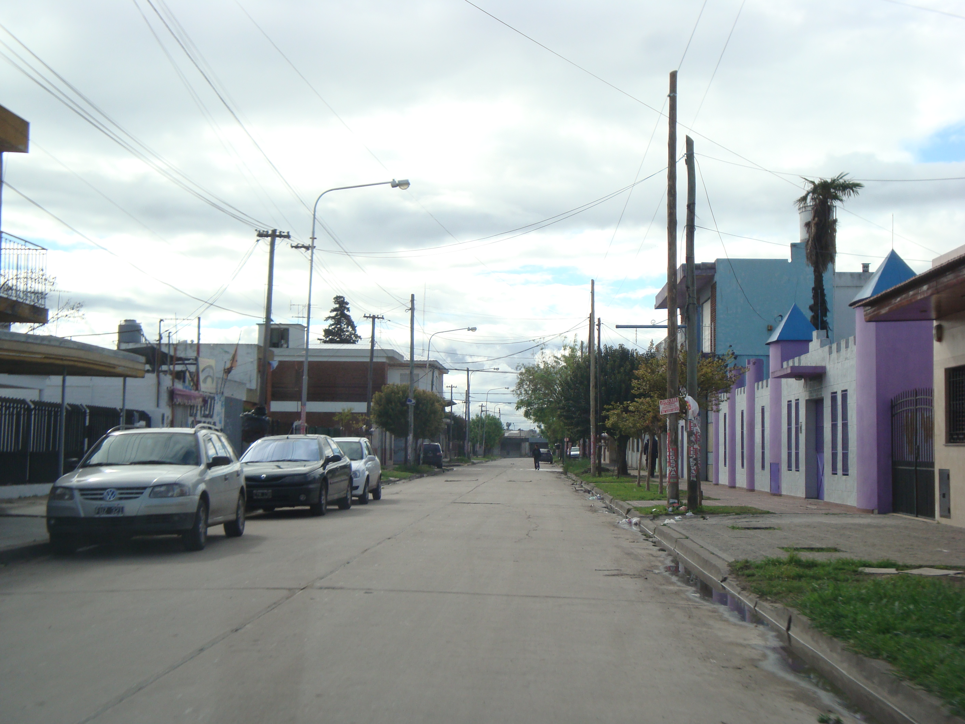 Calle de la ciudad de González Catán, octubre de 2011